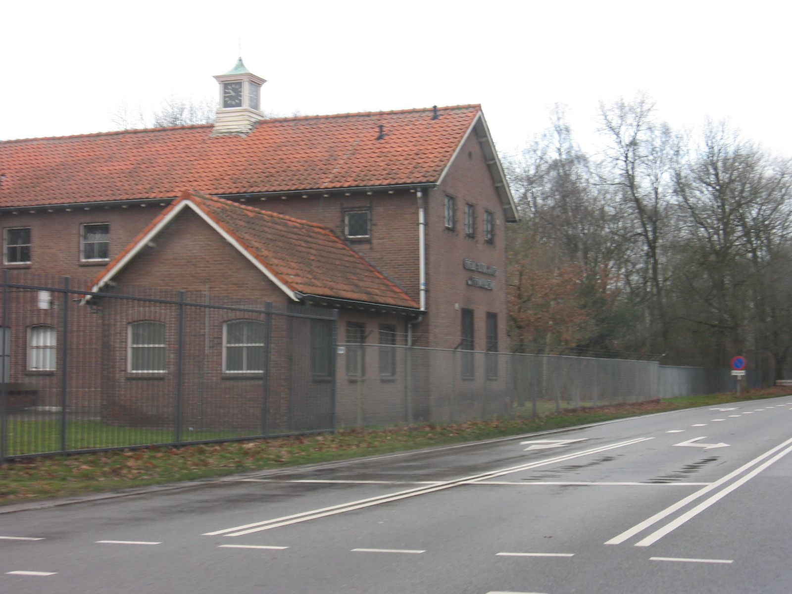 Oirschotse: Generaal Majoor de Ruyter van Steveninck Kazerne